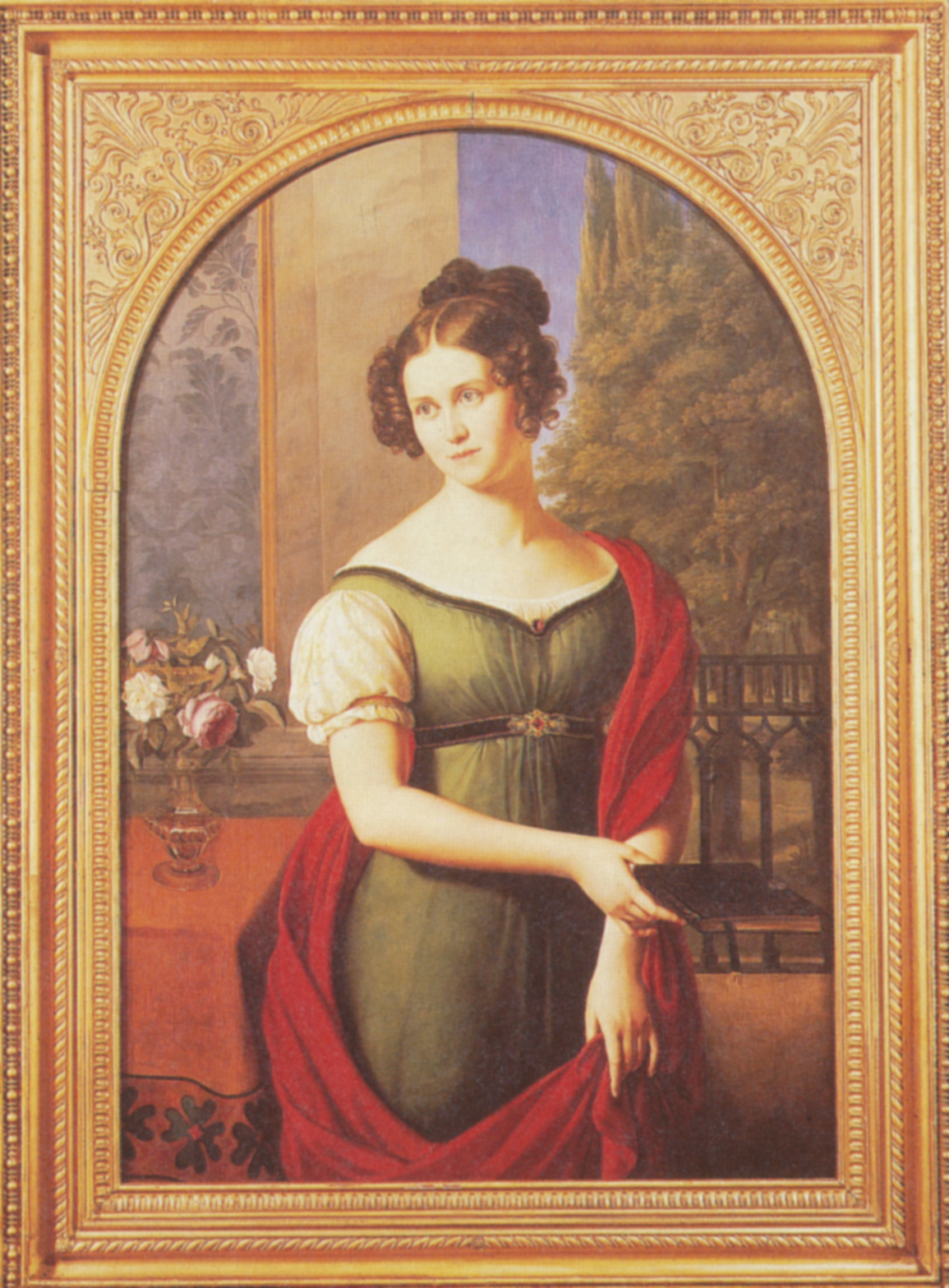 Wilhelm Schadow, Bildnis Lili Parthey, Ölgemälde 1827, Stiftung Stadtmuseum Berlin